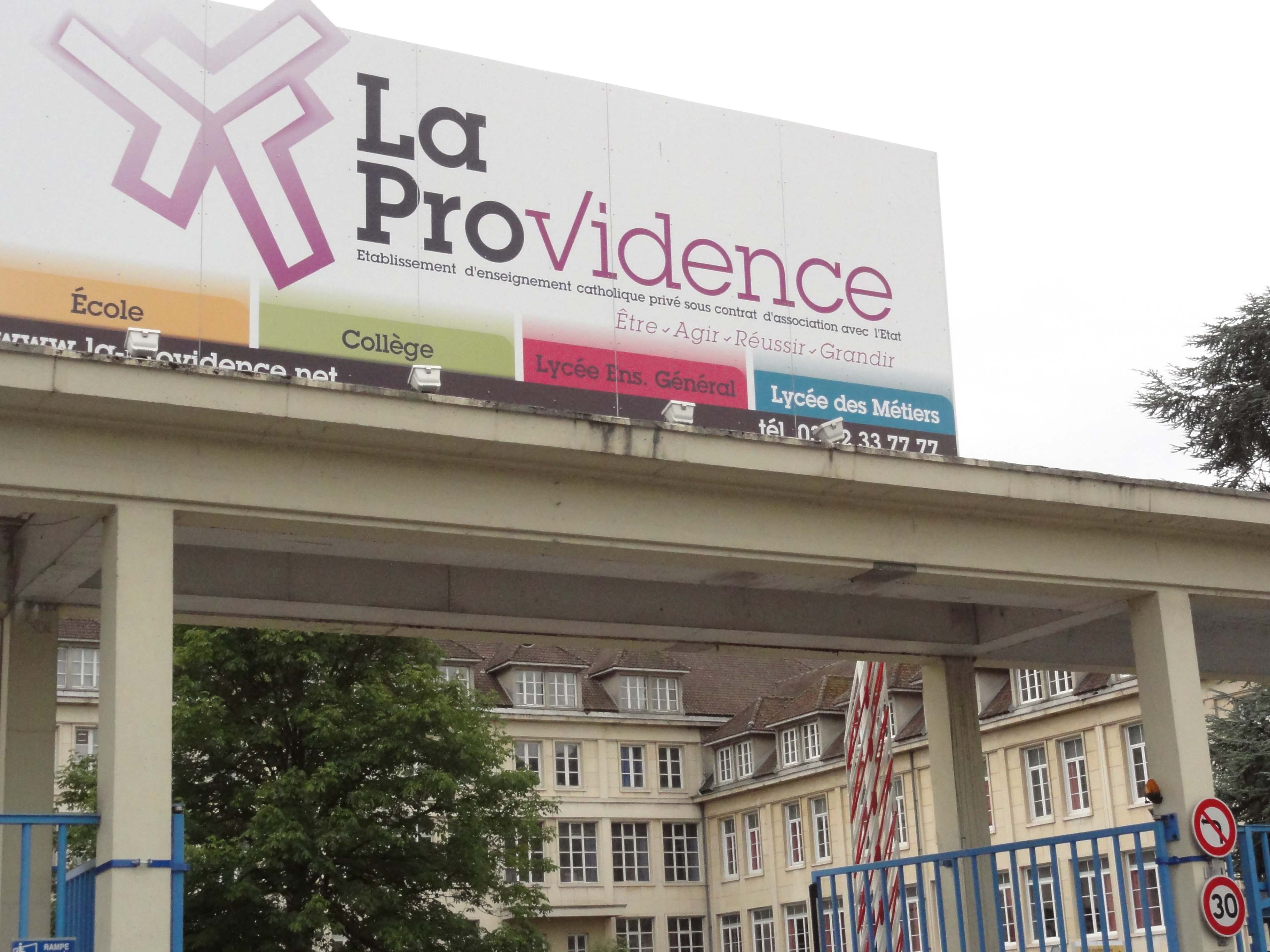 Amiens, La Providence (école et lycée) (01) entrée